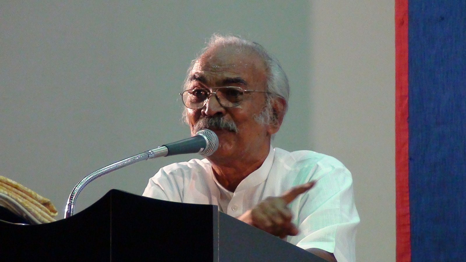 தமிழகத்தின் மிகச்சிறந்த எழுத்தாளரும் சாகித்திய அகாதெமி விருது பெற்றவருமான திரு. பொன்னீலன் அவர்கள்.